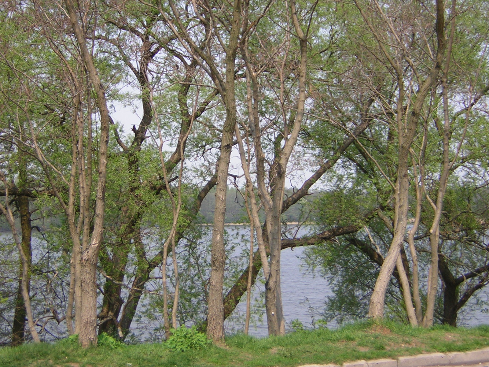 Jezioro Jeziorak za drzewami w Iławie